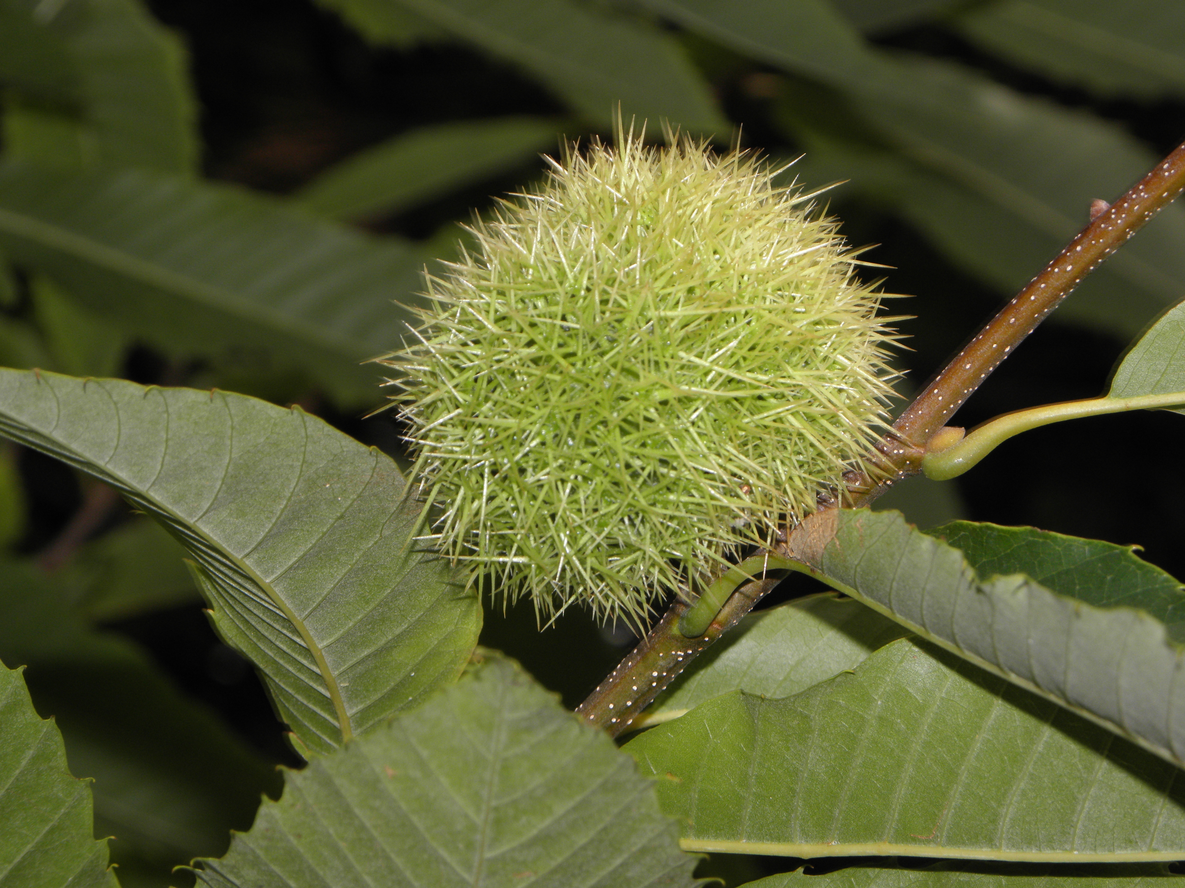 Xa empezan a sair os ourizos na Mahia, o cal quere decir que o verán vai tocando fin, empezan as escolas, risas, choros,carreiras, compras, a rutina volve o Val